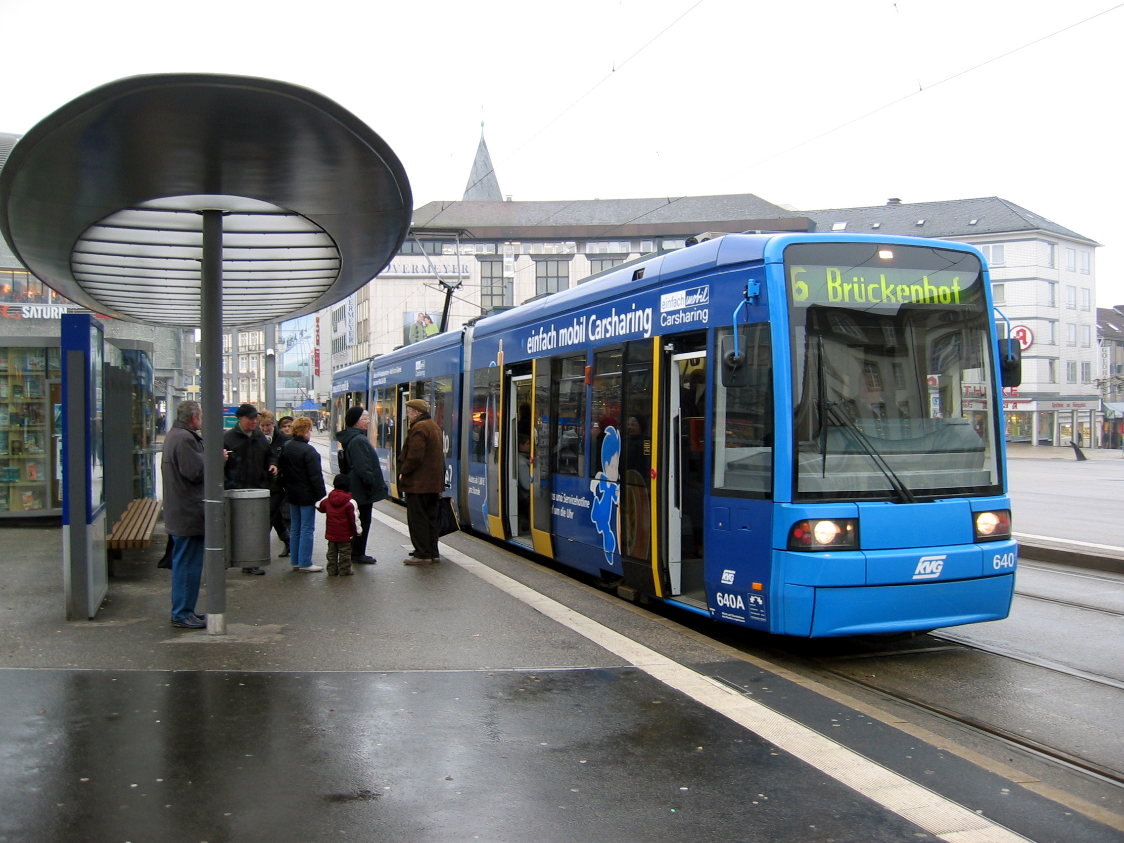 Kassel, Königsplatz, Straßenbahnhaltestelle – Zweirichtungstriebwagen #640 am Königsplatz.